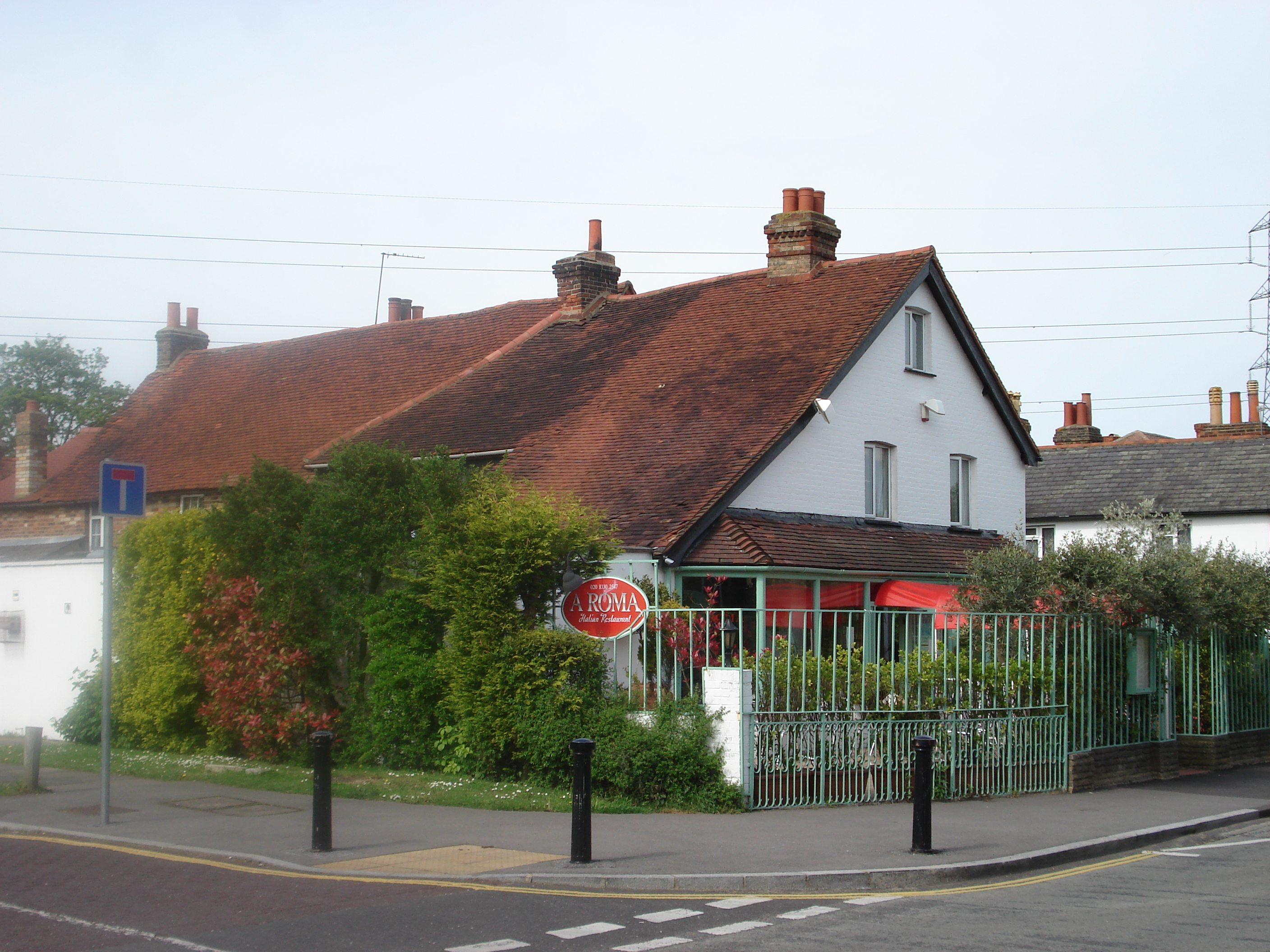 a roma restaurant old malden